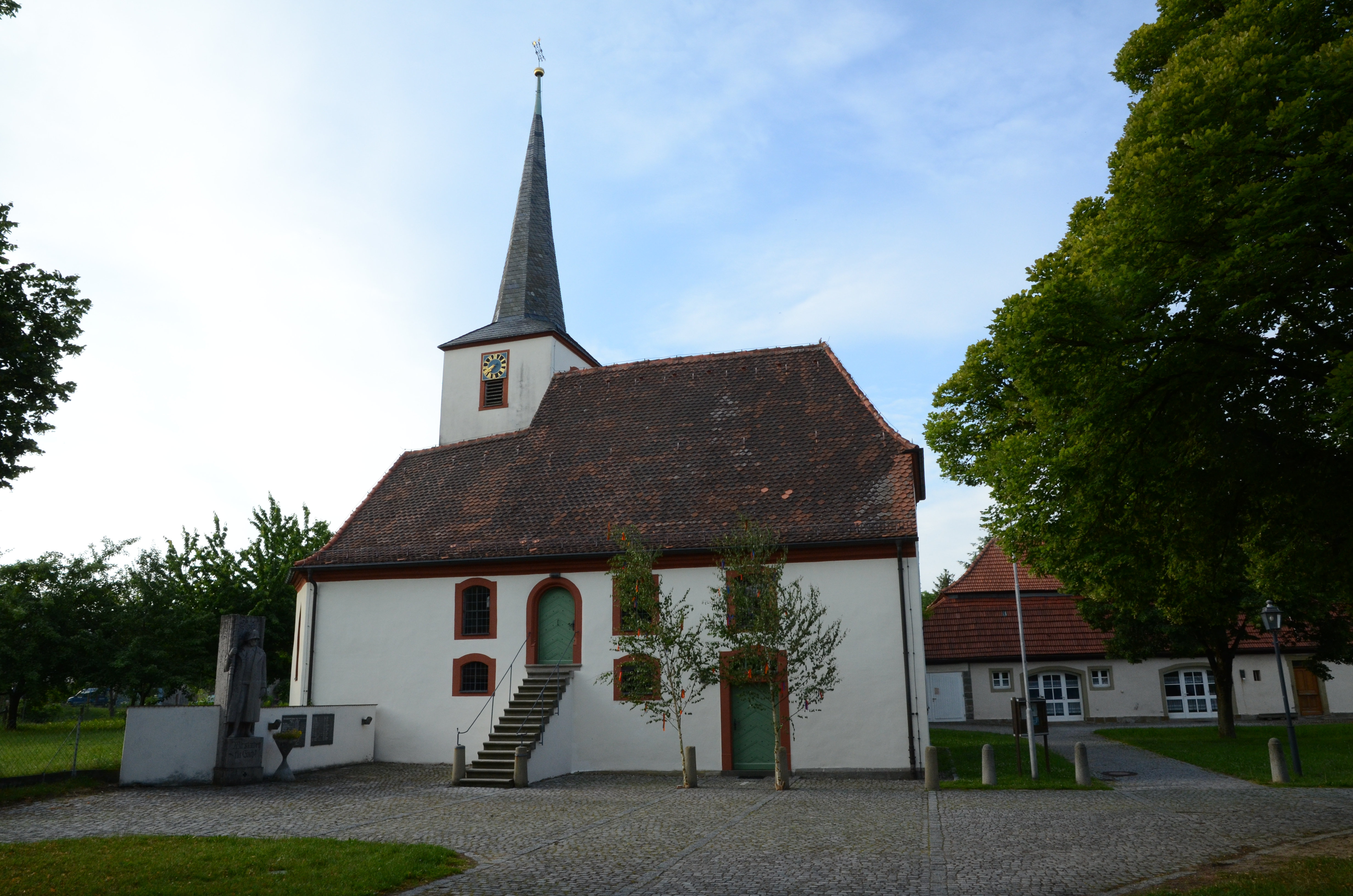 Altenschönbach St. Marien